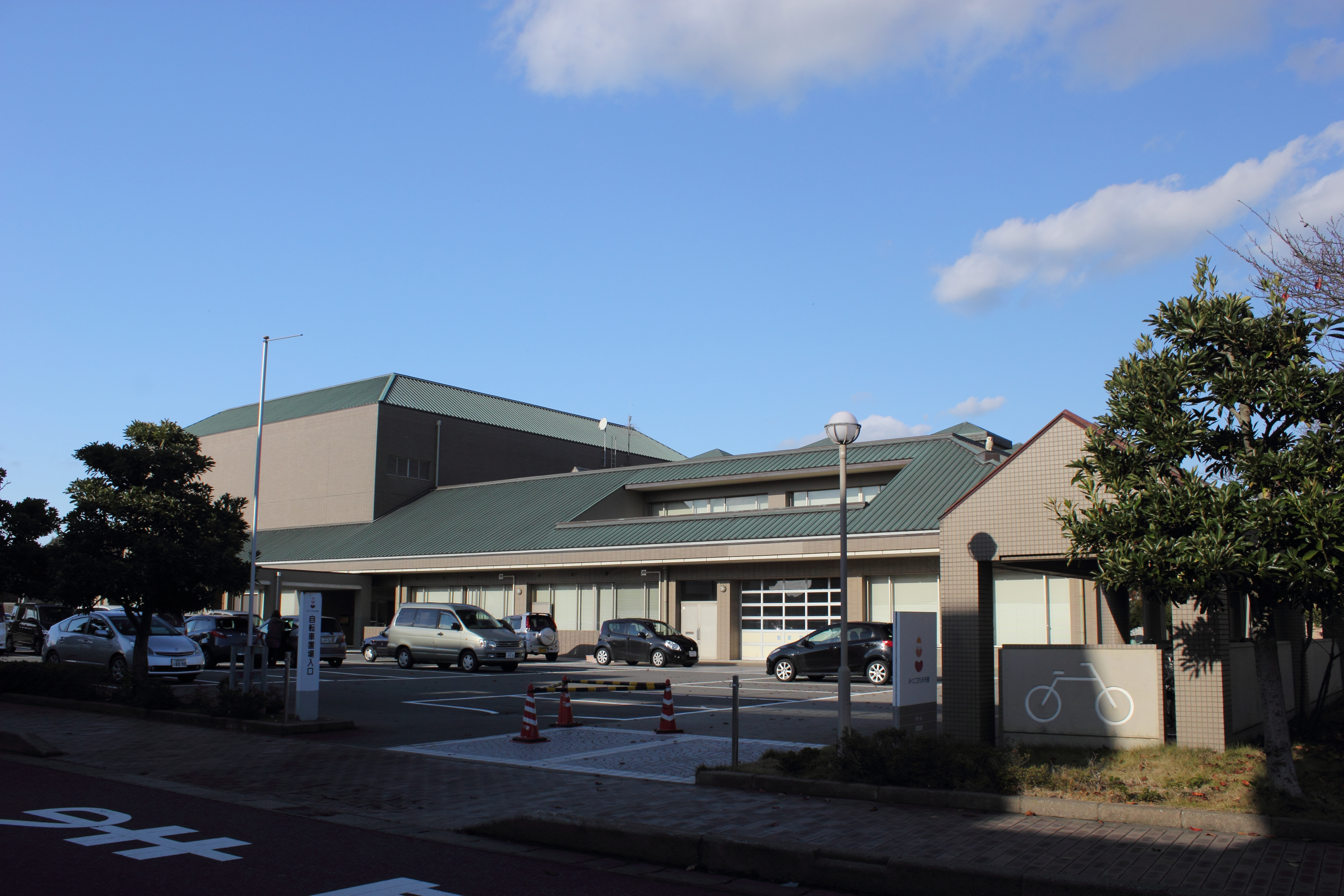 坂井市立三国図書館